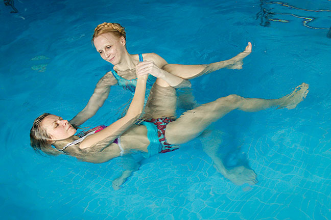 Watsu terapija